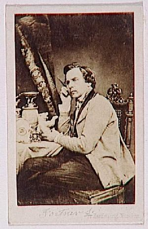 Andreas Fortner (1809-1862), böhmischer Silberschmied, Maler, Lithograph und Ziseleur